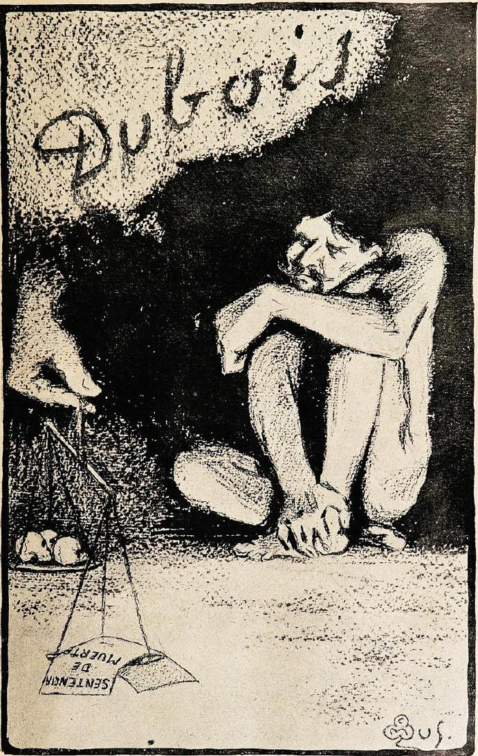 Caricatura del Louis Amadeo Brihier Lacroix, también conocido por sus alias Émile Dubois, Emilio Dubois, Émile Murraley o Emilio Morales (Étaples, Pas-de-Calais, Francia, 29 de abril de 1867 - Valparaíso, Chile, 26 de marzo de 1907), fue un ladrón y asesino en serie francés.